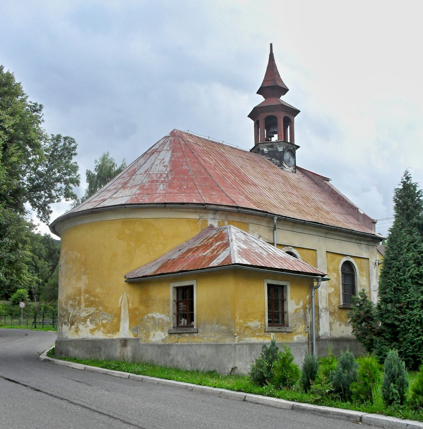 Kostel svatého Vojtěcha v liberecké čtvrti Ostašov